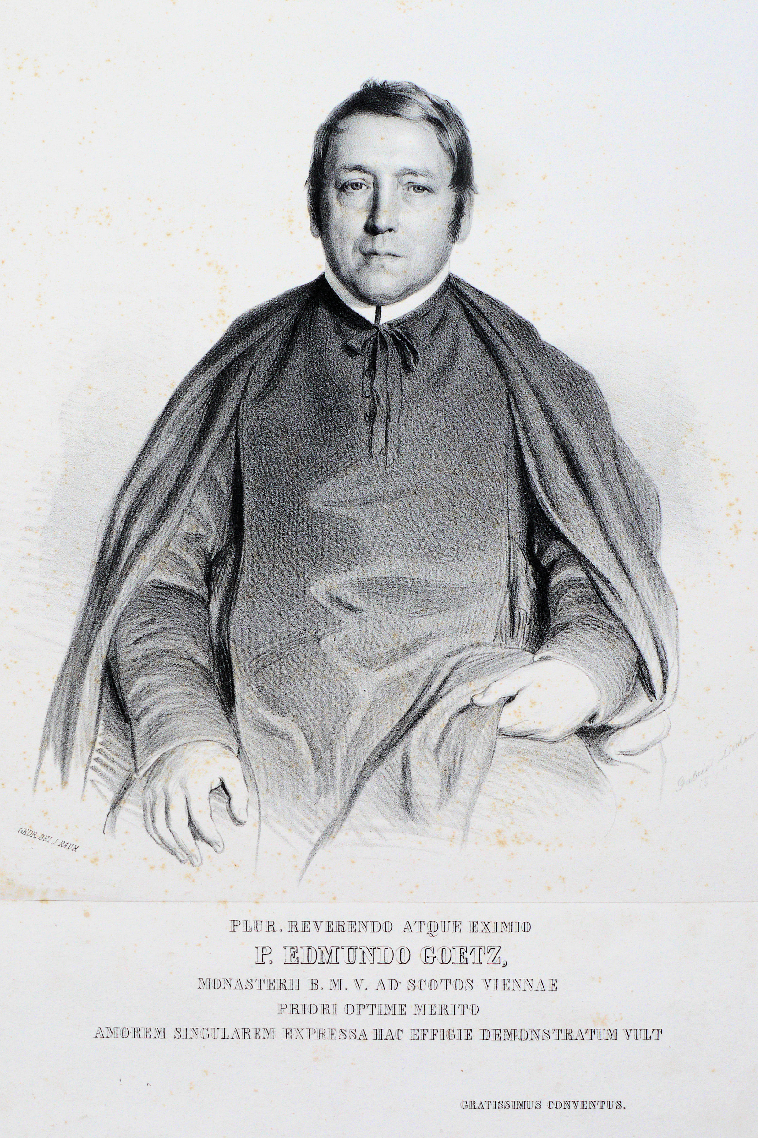 Edmund Götz (1792-1852), österreichischer Priester, Benediktiner im Kloster zu den Schotten in Wien. Lithographie von Gabriel Decker. 1844